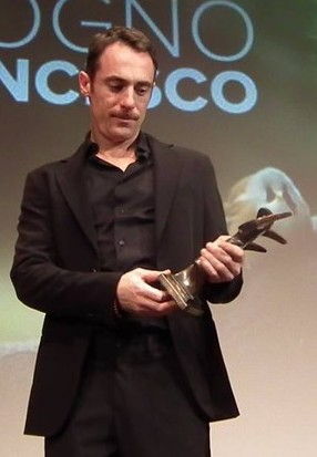 Popoli e Religioni - Terni Film Festival, Premio alla Carriera a Elio Germano